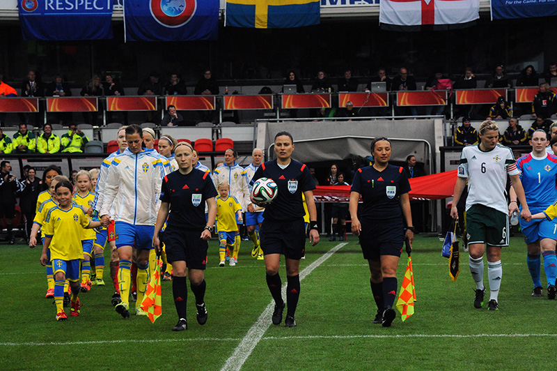 Anastasia Pustovoitova (2014)